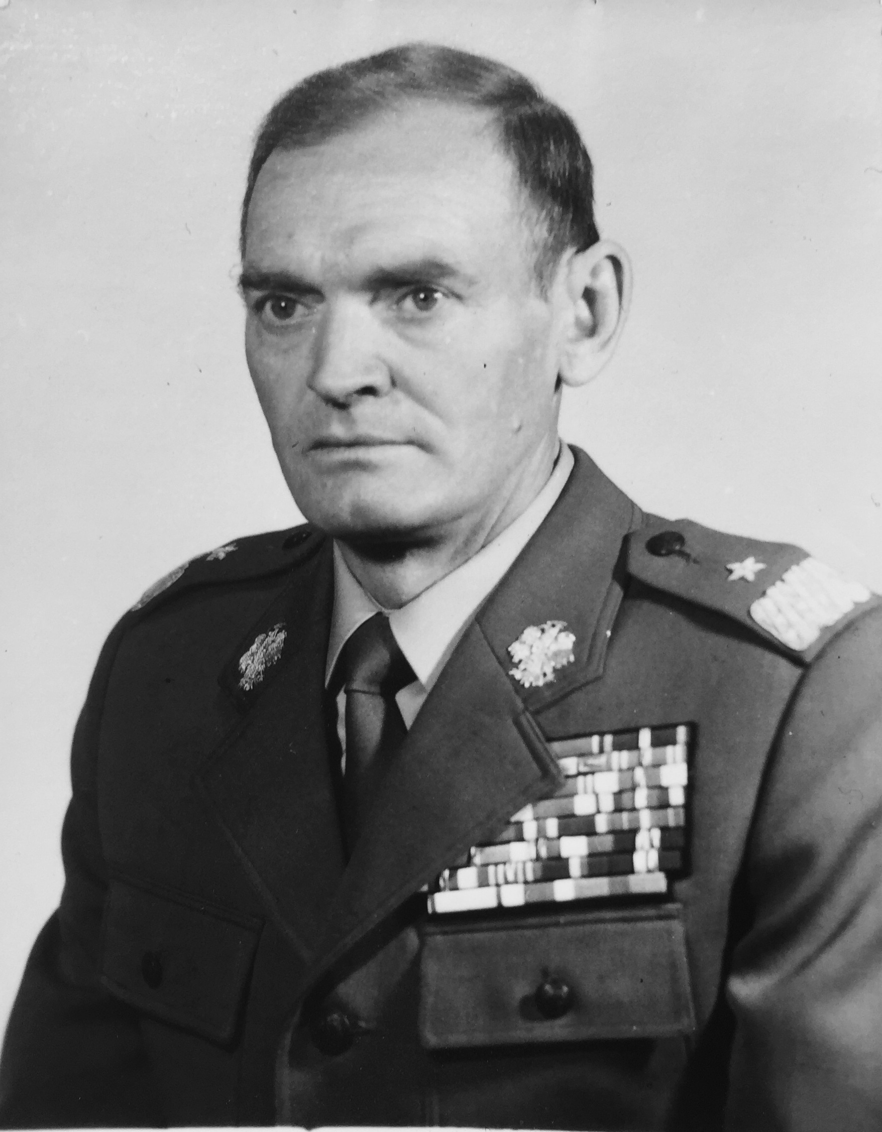 Kazimierz Tomaszewski